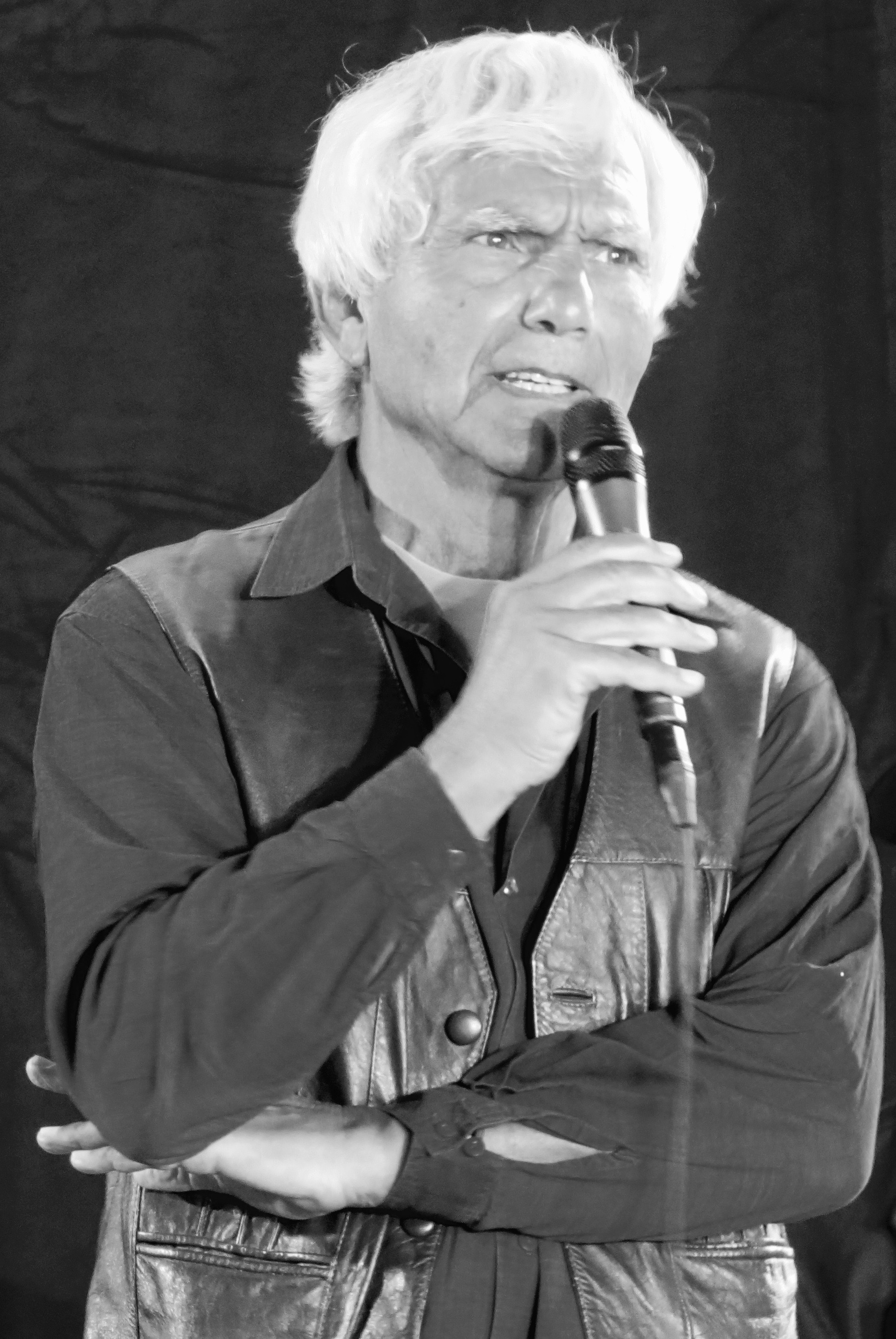 Eugenio Barba, teaterinstruktør